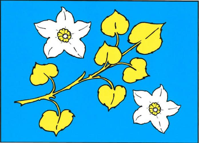 vlajka, Kochánov, okres Havlíčkův Brod